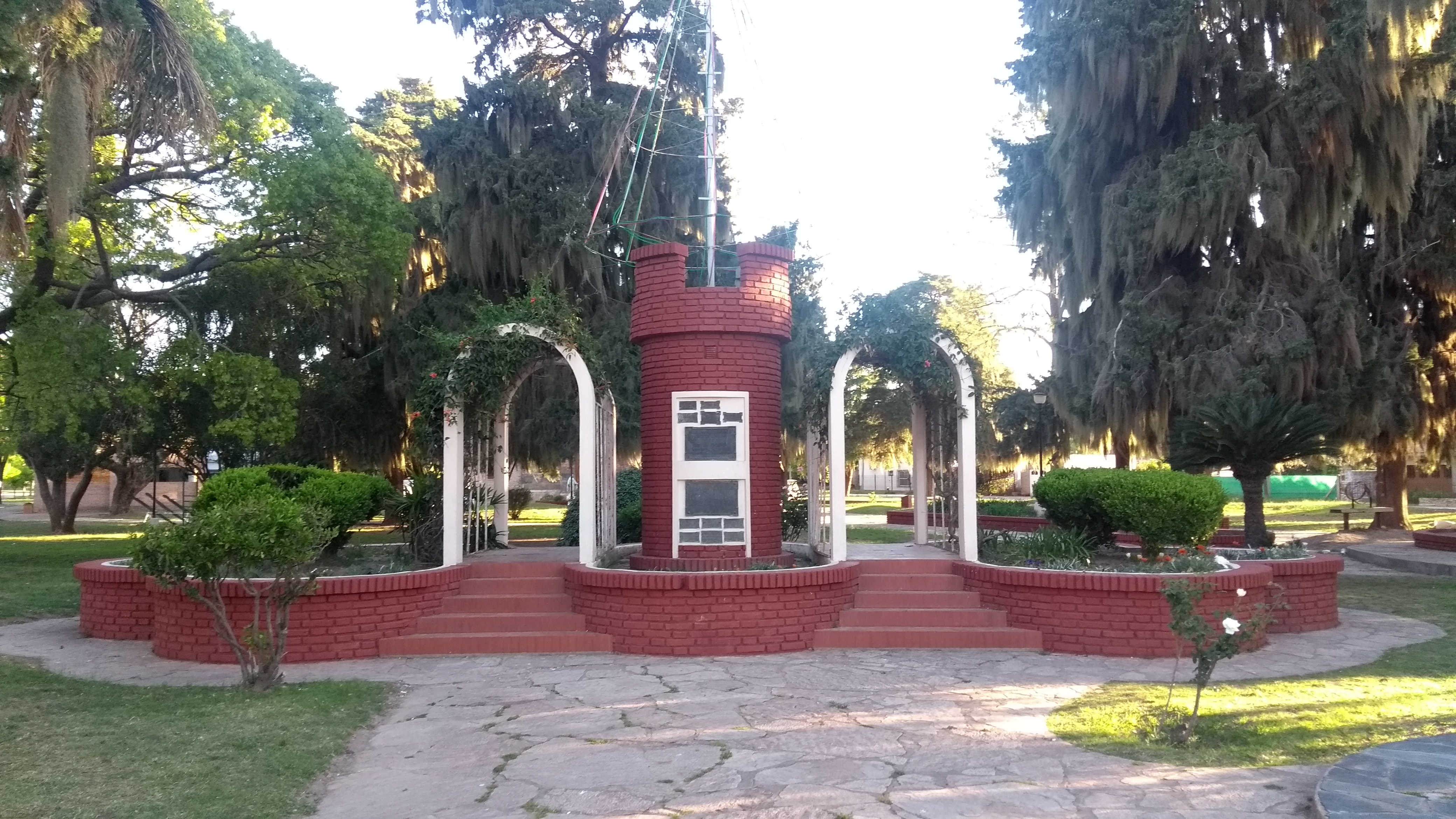 Vista de la ex fuente en conmemoración al centenario de la localidad